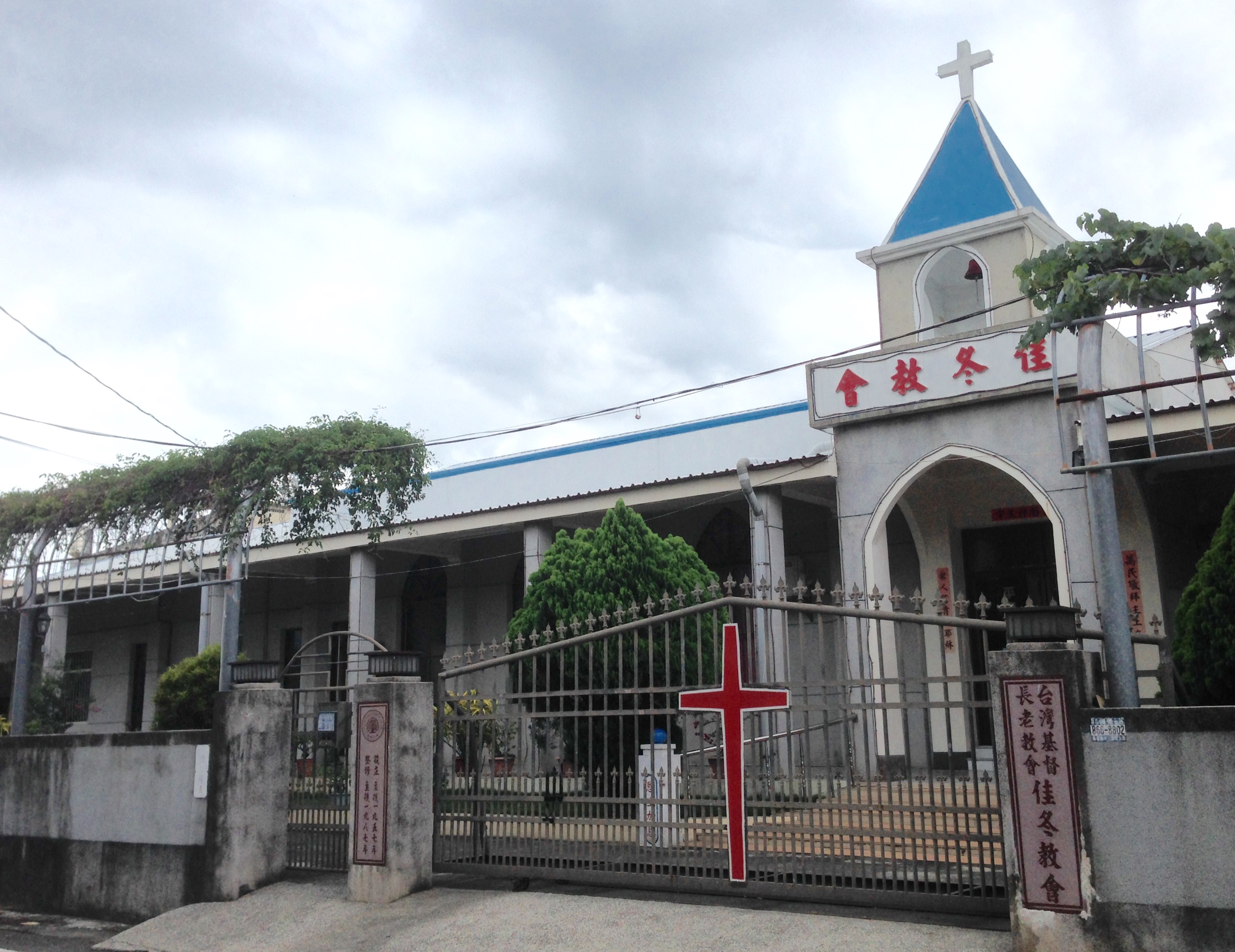 佳冬長老教會